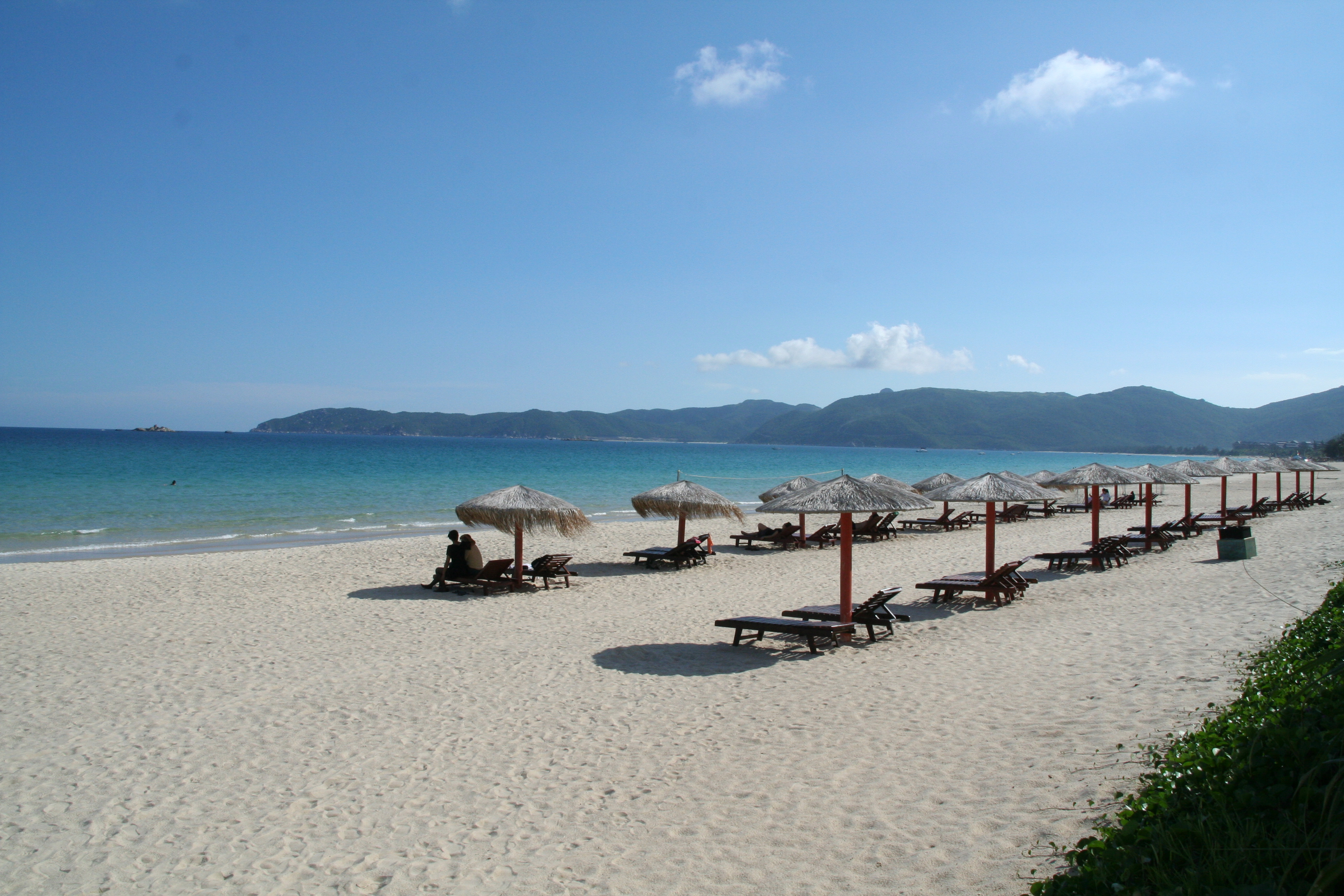 Fra stranden på Hainan